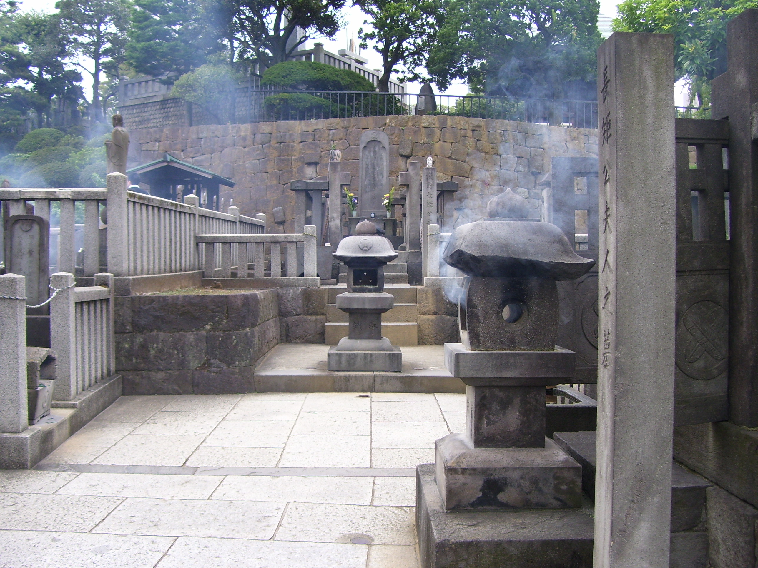 Tumbas de los 47 Ronin en el templo Sengakuji, Tokyo.